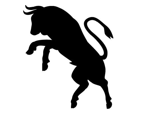 Meuble taureau furieux